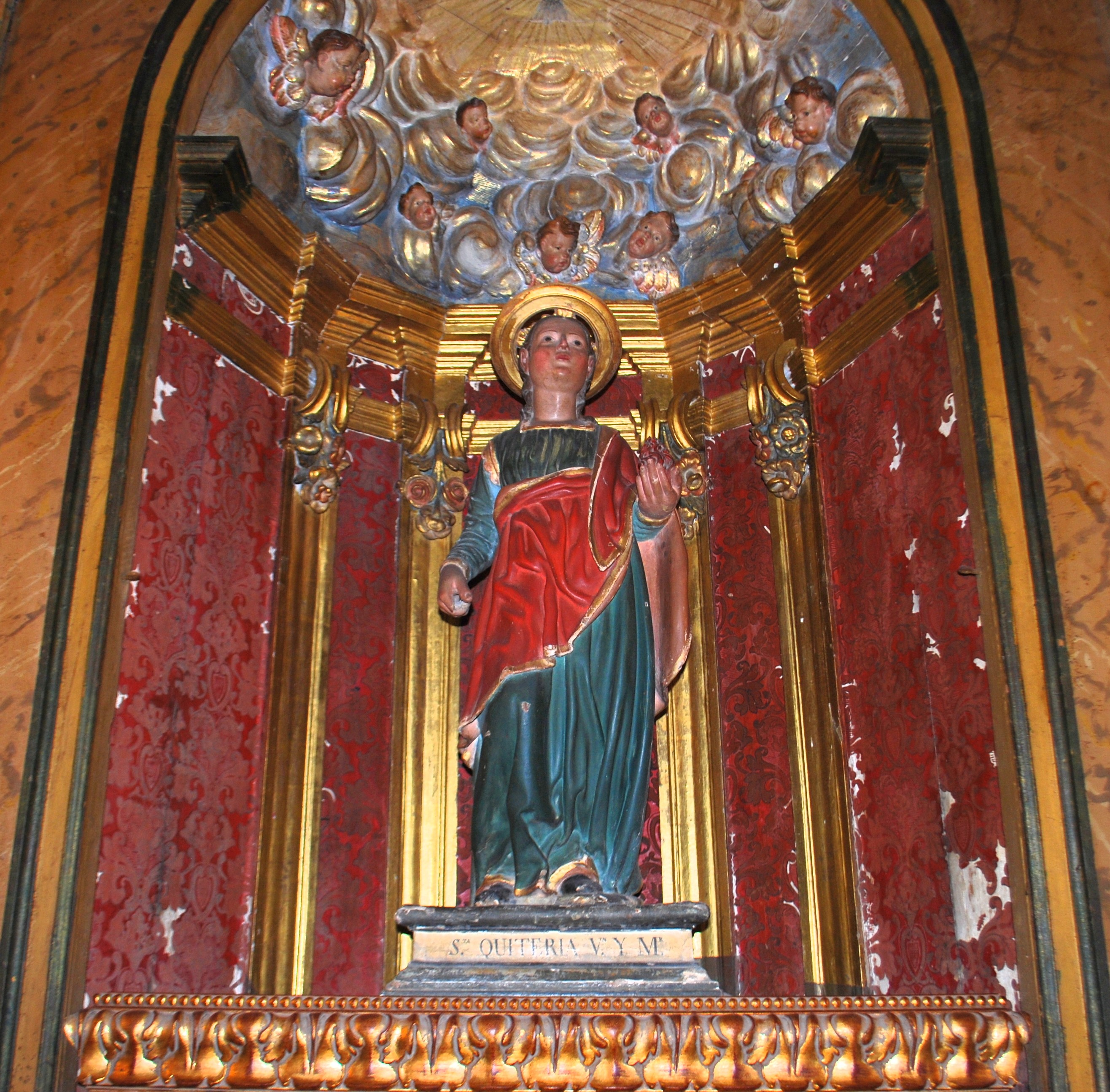 Imatge de sant Quitèria a una capella lateral de l'església de sant Antoniet a la ciutat de Mallorca